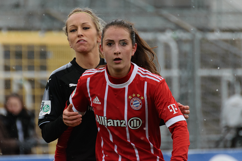 Sara Däbritz 2017 (mit Kathrin Hendrich FFC Frankfurt)